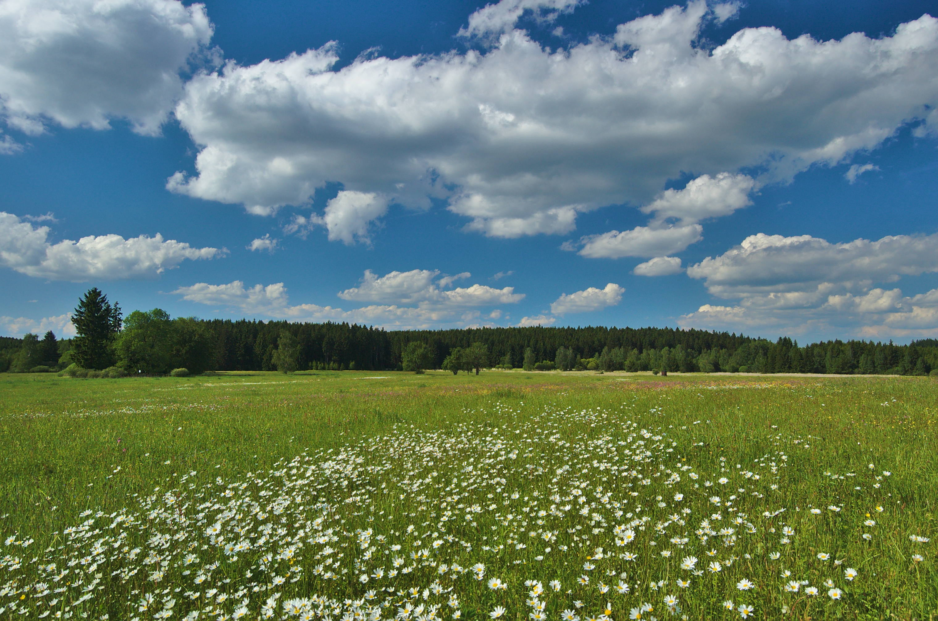 Přírodní rezervace Pavlovské mokřady